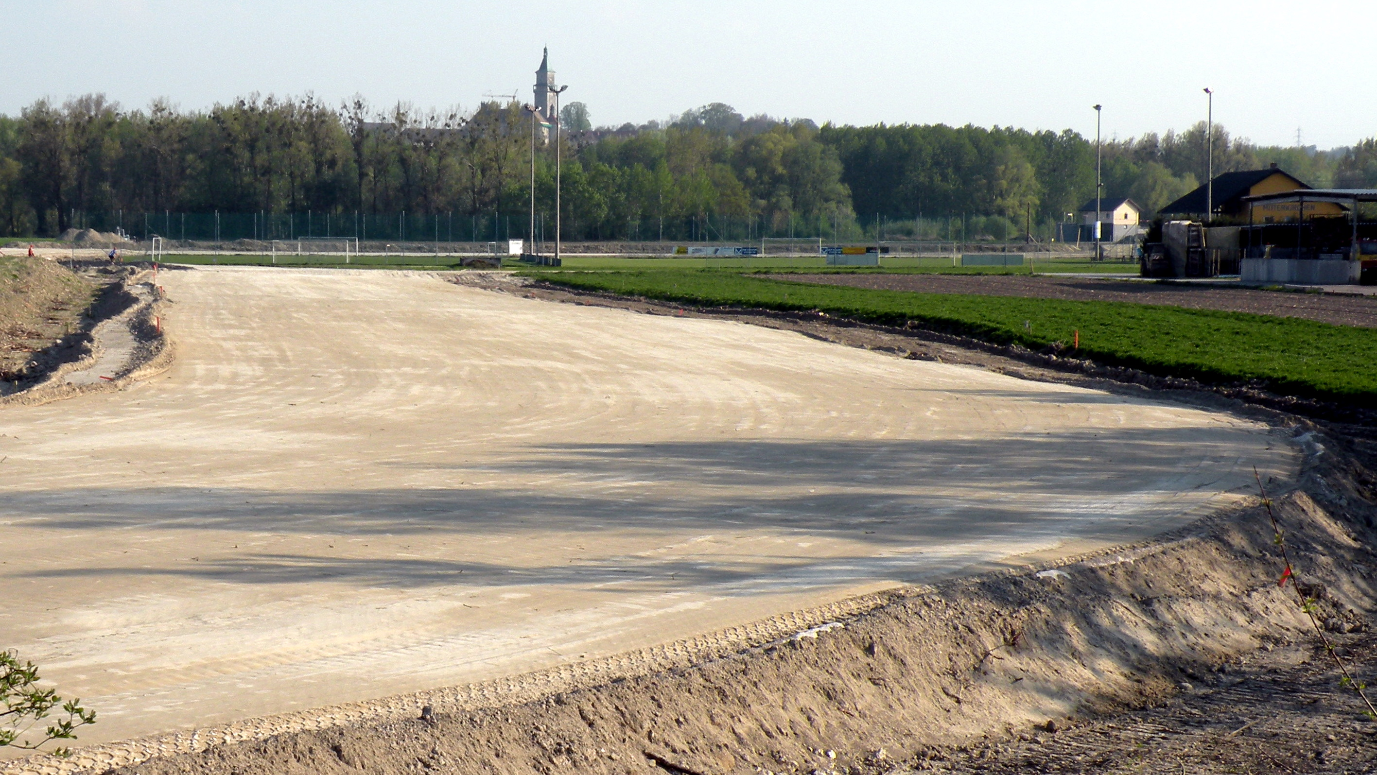 Dammsohle für den Machlanddamm im Baulos 2 bei Mitterkirchen im Machland